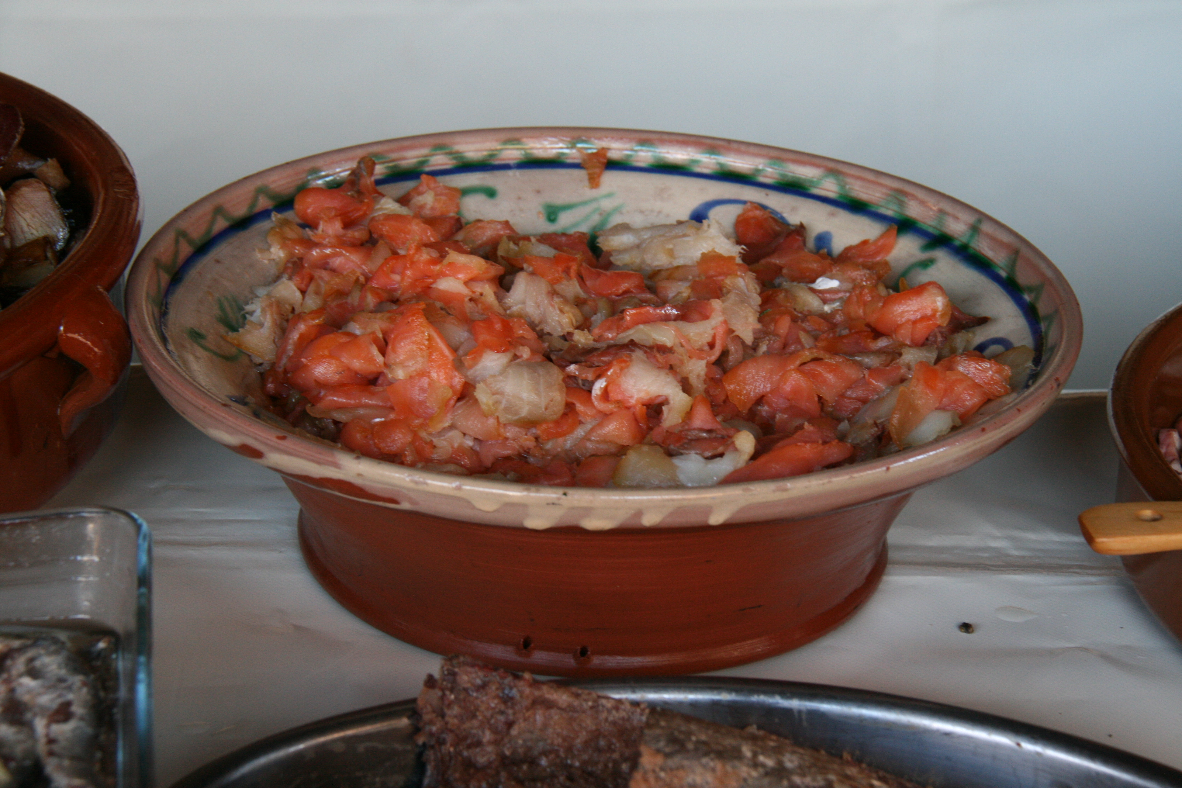 Salazón diversos de pescados